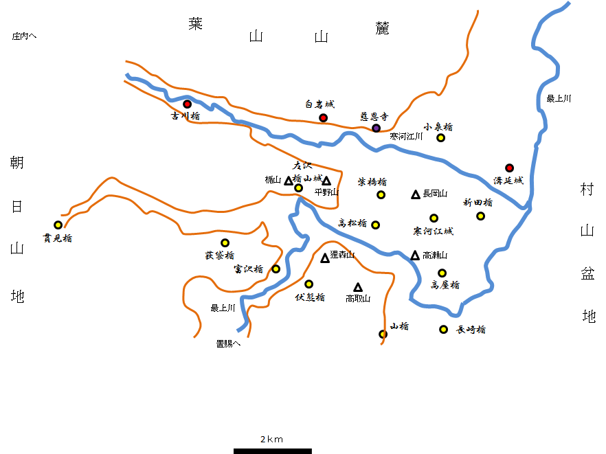 白岩氏の居城と寒河江氏諸族の城館